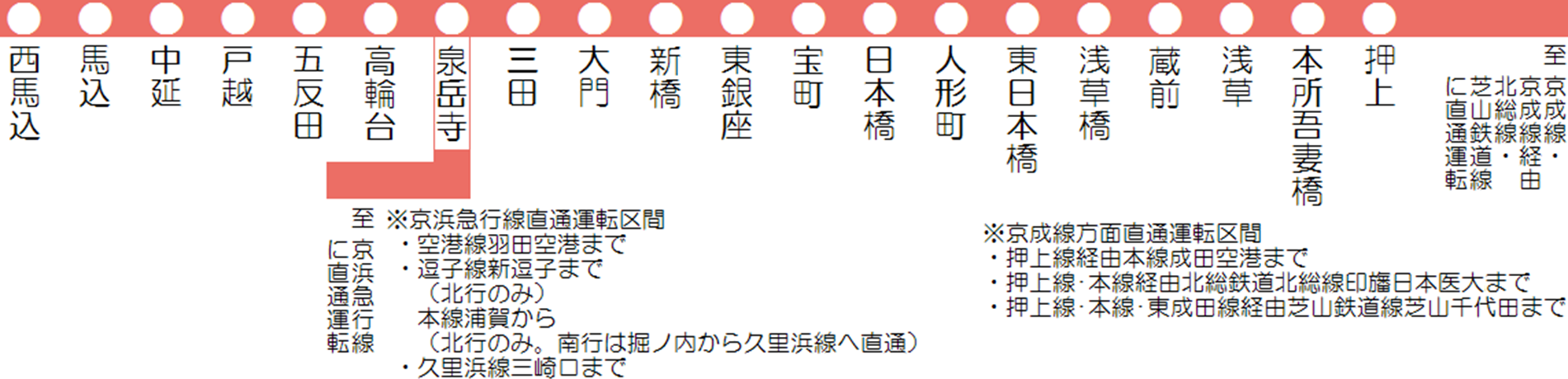 都営地下鉄浅草線の路線図 ・より良い画像があれば差し替えていただいてかまいません。